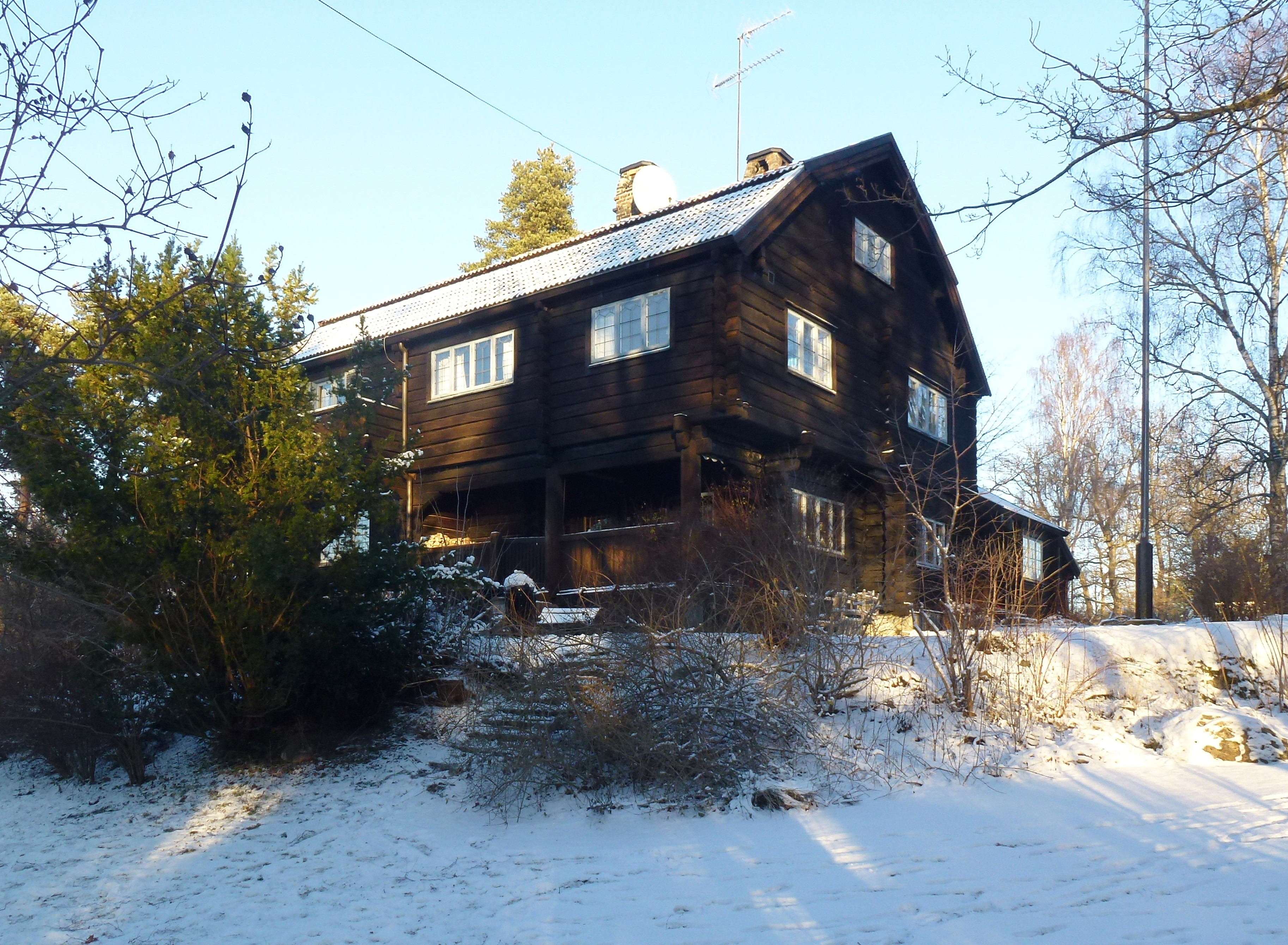 Laurinska villan, Hildingavägen 26, Danderyd, arkitekt Karl Güettler